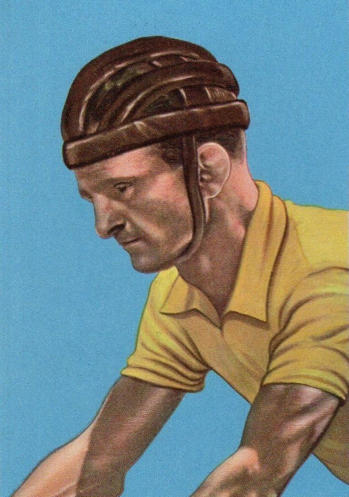 Jean Robic en 1947, 'Il Ciclismo 1959 - 1960', Sidam (Milano ed.), figurina n°79.